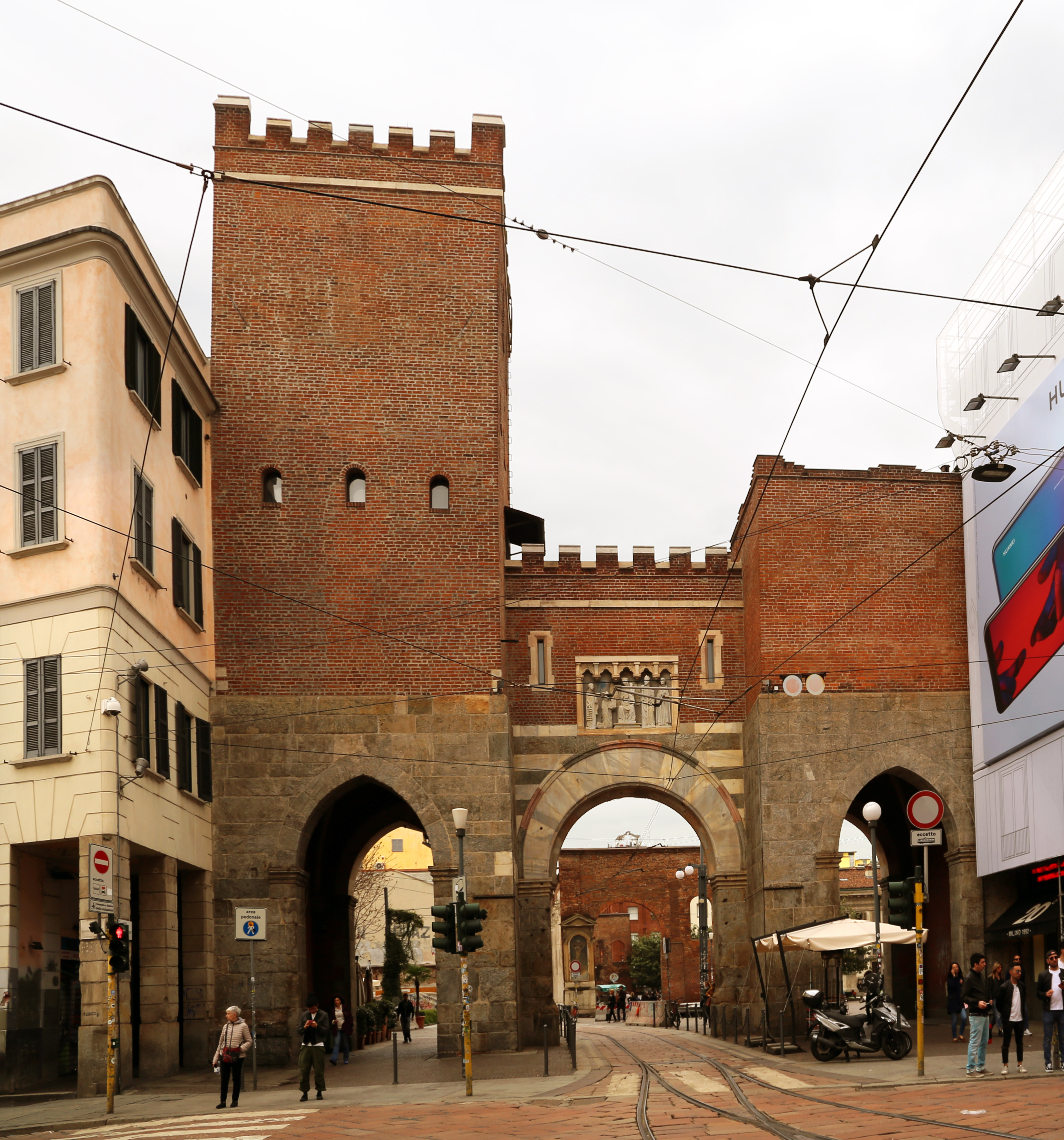 Porta Ticinese This is a photo of a monument which is part of cultural heritage of Italy.